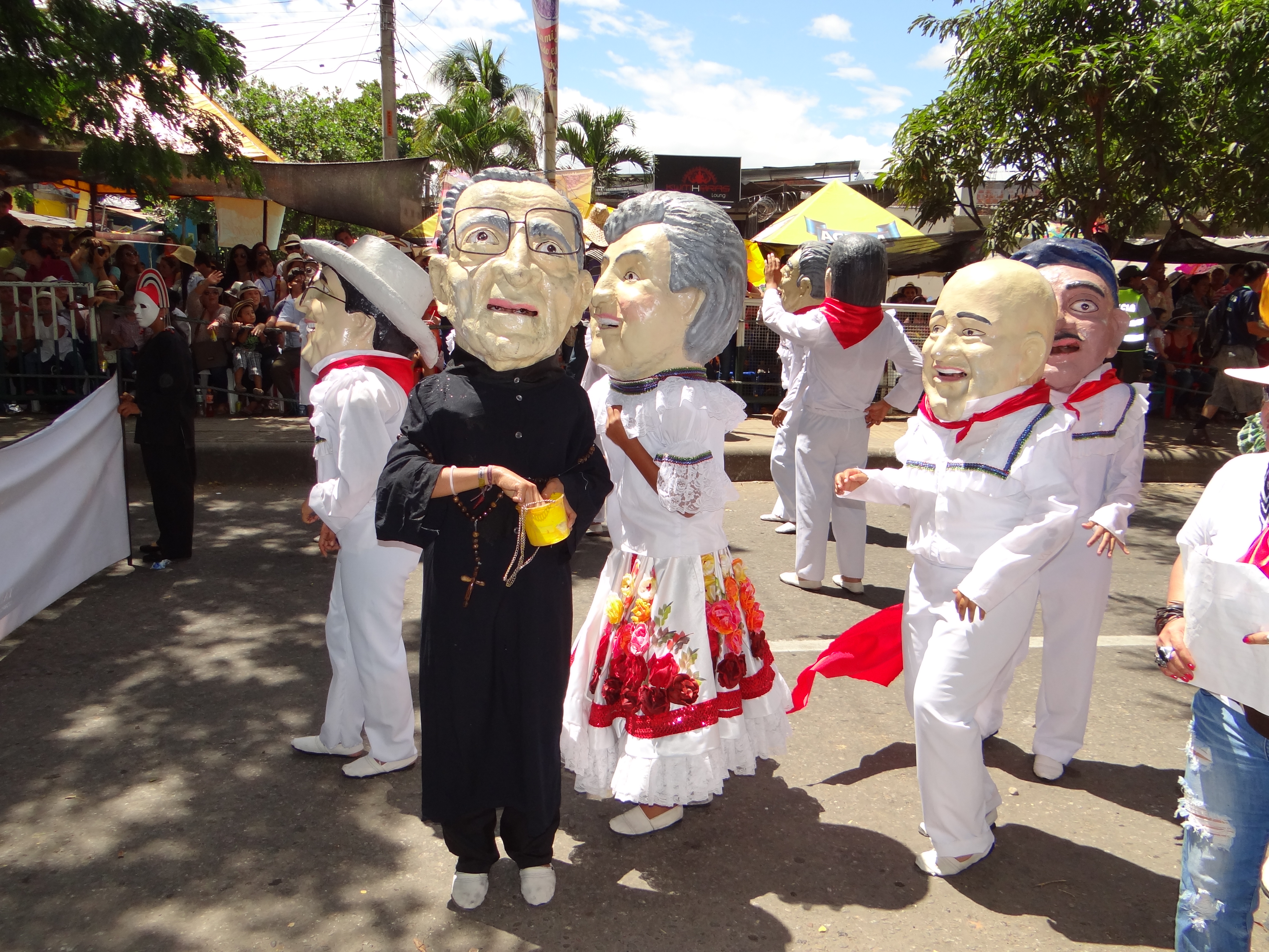 Fiestas de San Pedro en Neiva